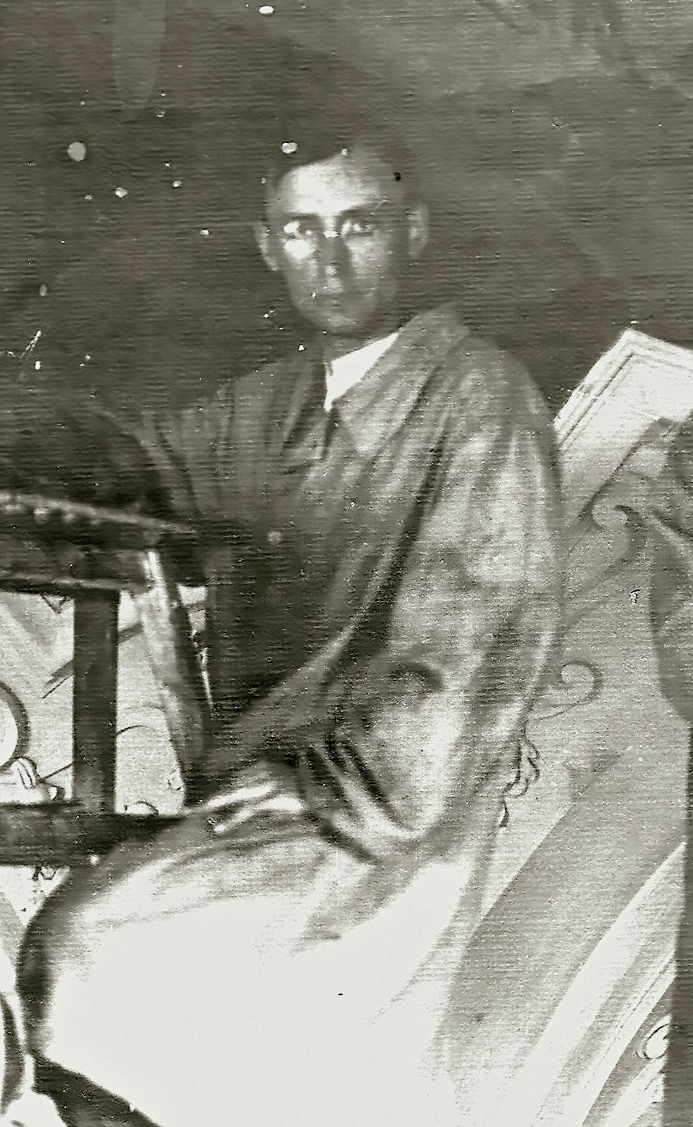 J.T.Blažek malíř 1917 při práci v kostele sv.Mikuláše na Staroměstském náměstí v Praze v roce 1917